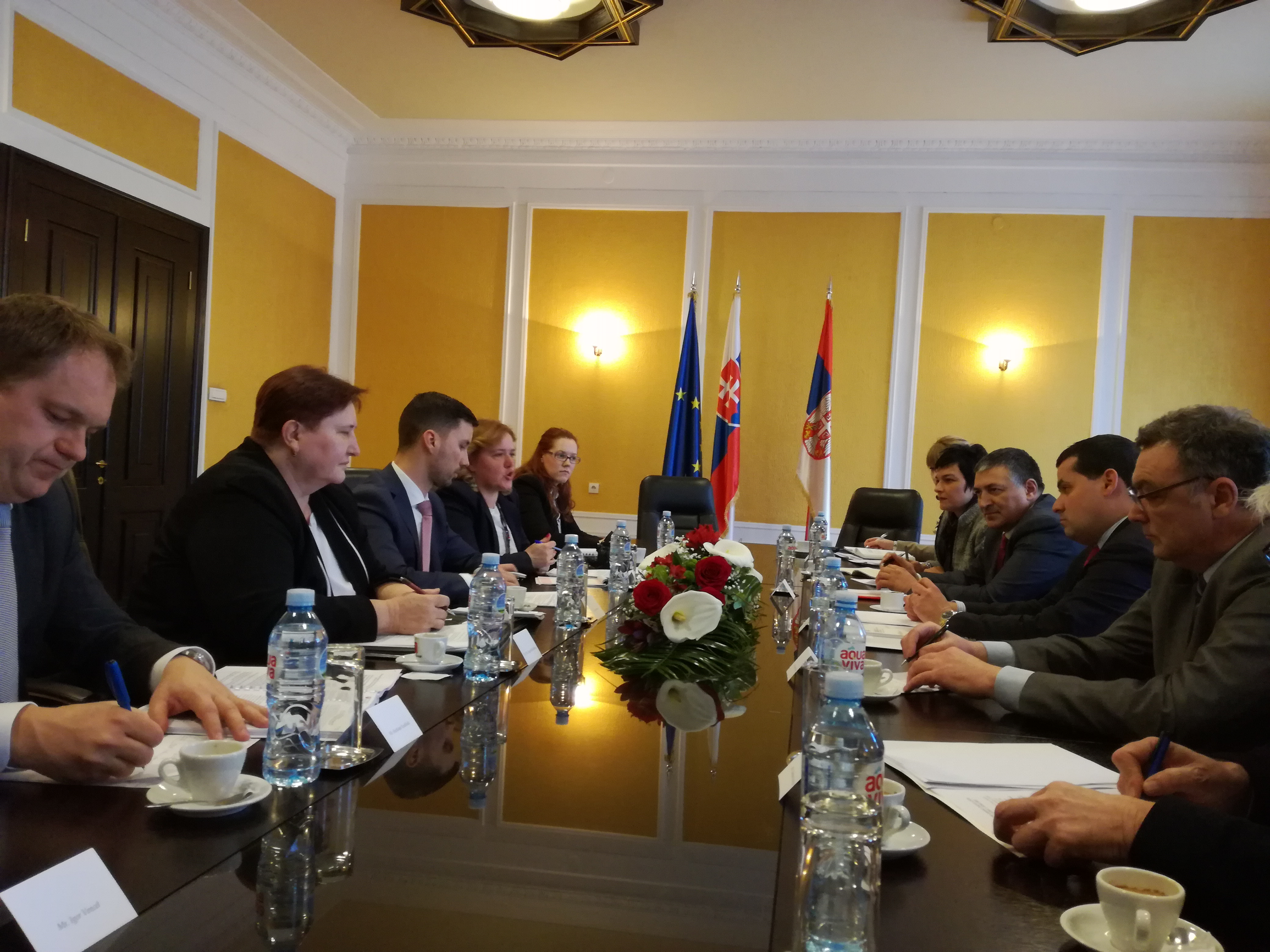 Susret državnih sekretara Ministarstva spoljnih poslova Republike Srbije sa državnim sekretarom Ministarstva inostranih i evropskih poslova Slovačke Republike Lukašem Parizekom.